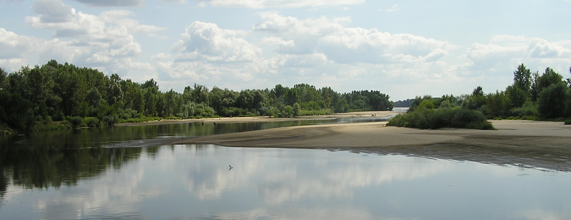 Zdjęcie wykonane 8 sierpnia 2009 r. z prawego brzegu Wisły, w kierunku południowym, w rezerwacie przyrody Wyspy Zawadowskie. Łacha widoczna w prawej części zdjęcia stanowi fragment dużej wyspy usytuowanej w środku koryta rzeki. Zdjęcie wykonane zostało przy niskim poziomie wody. Według IMGW w dniu wykonania zdjęcia na wodowskazie Warszawa-Nadwilanówka zaobserwowano poziom 233 cm wody.